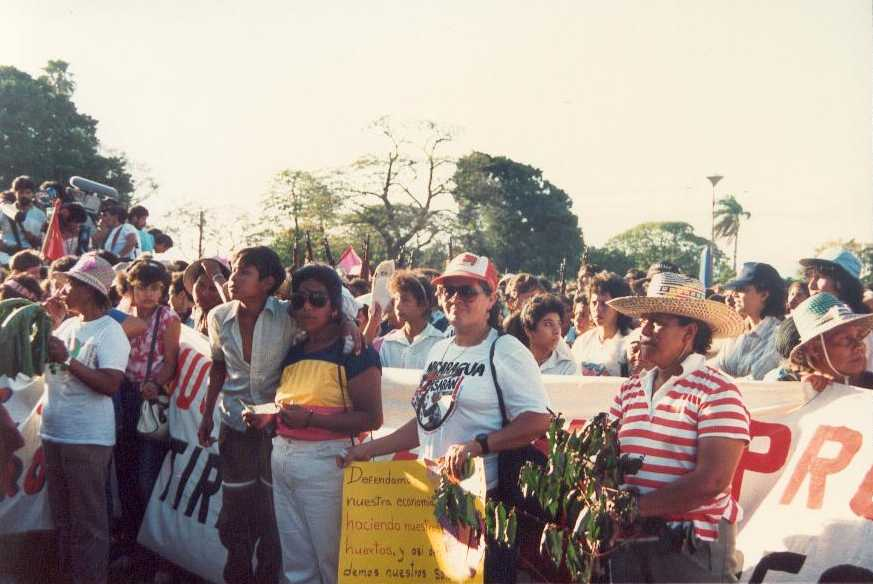 Celebración del Día Internacional de la Mujer Trabajadora en Managua, Nicaragua, America Central en 1988.